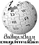 Logo of the Basa Jawa Wikipedia ꦮꦶꦏꦶꦥꦺꦢꦶꦪꦃ ꦧꦲꦸꦮꦂꦤ​ꦩꦂꦢꦶꦏ​wikipediyah bauwarna mardika